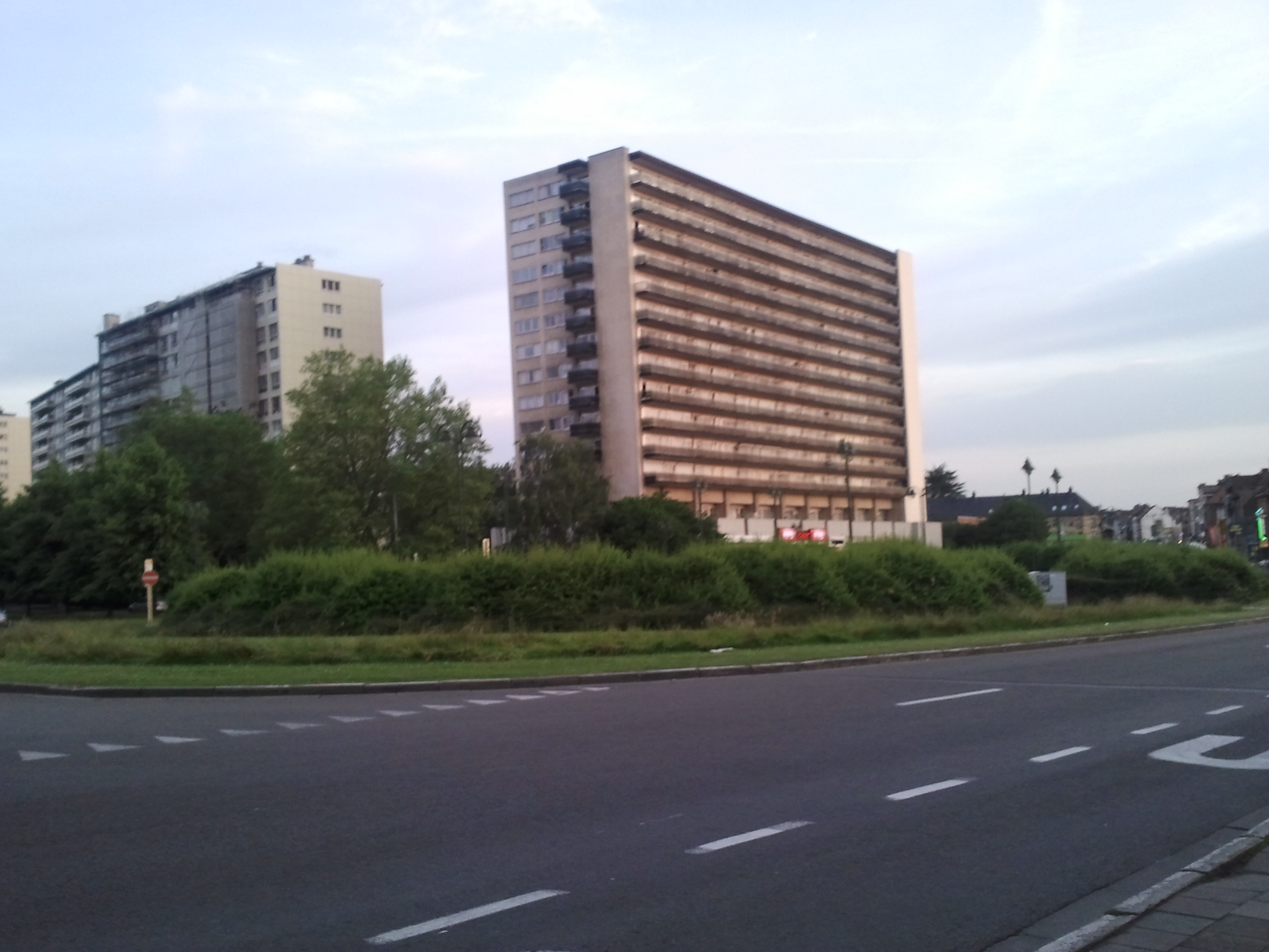 Kruispunt Veeweide (Anderlecht)